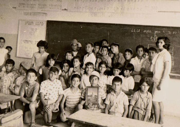 תמונה כיתתית בבית הספר תחכמוני בבית שאן , שנות השישים